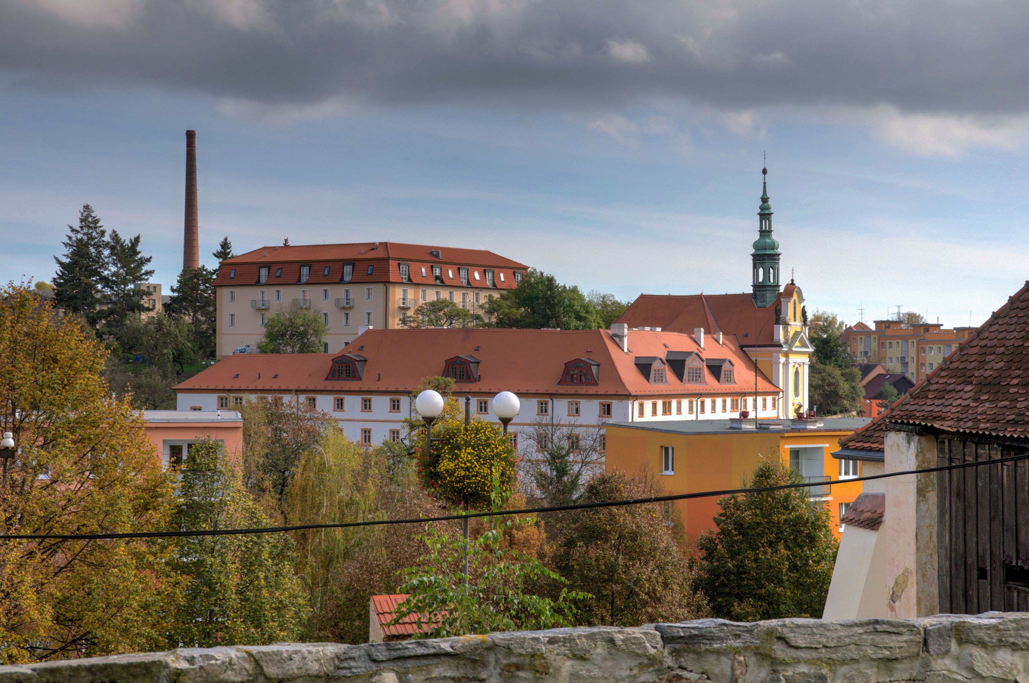 Klášter alžbětinek s kostelem Svaté rodiny, Rokelská 234, Kadaň.